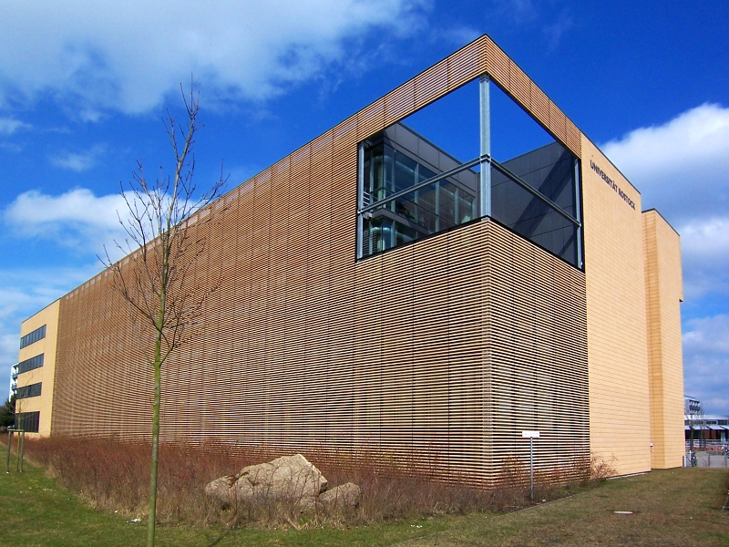 Die neue Universitätsbibliothek im Südstadtcampus